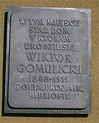 Tablica upamiętniająca miejsce w którym urodził się Wiktor Gomulicki. (Ostrołęka)